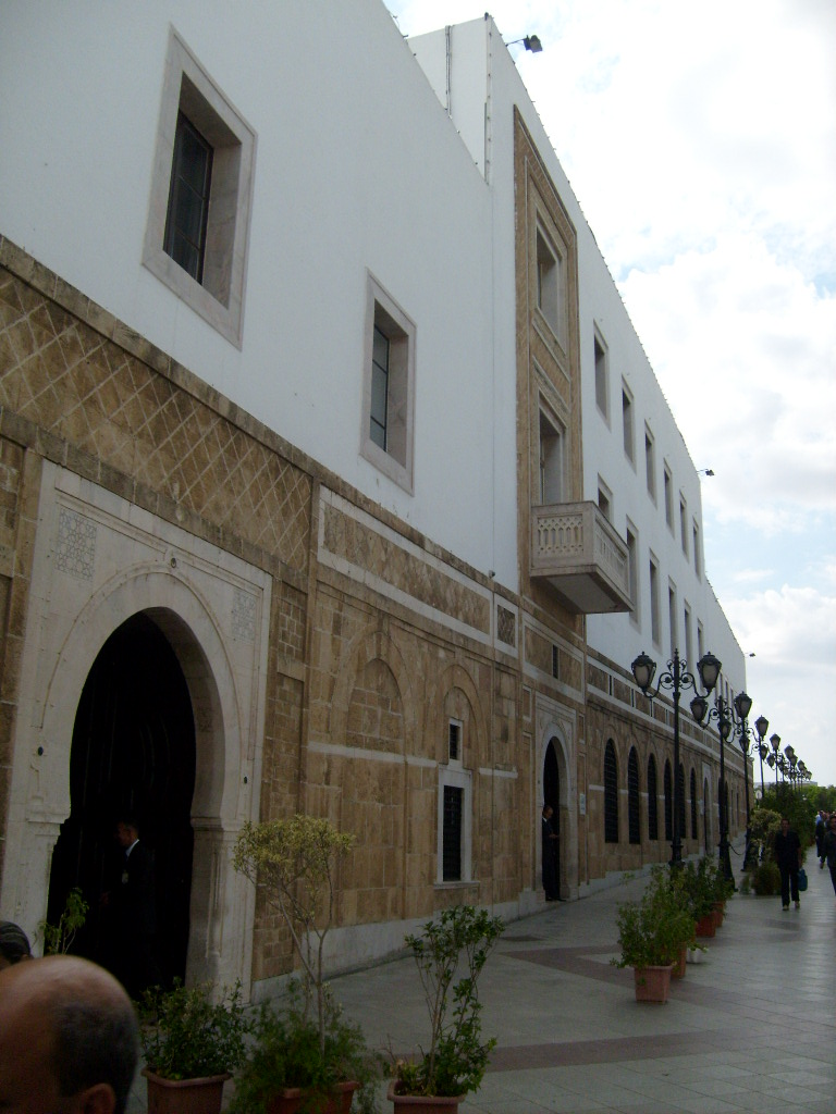 Dar El Bey, siège du premier ministère tunisien dans la médina de Tunis